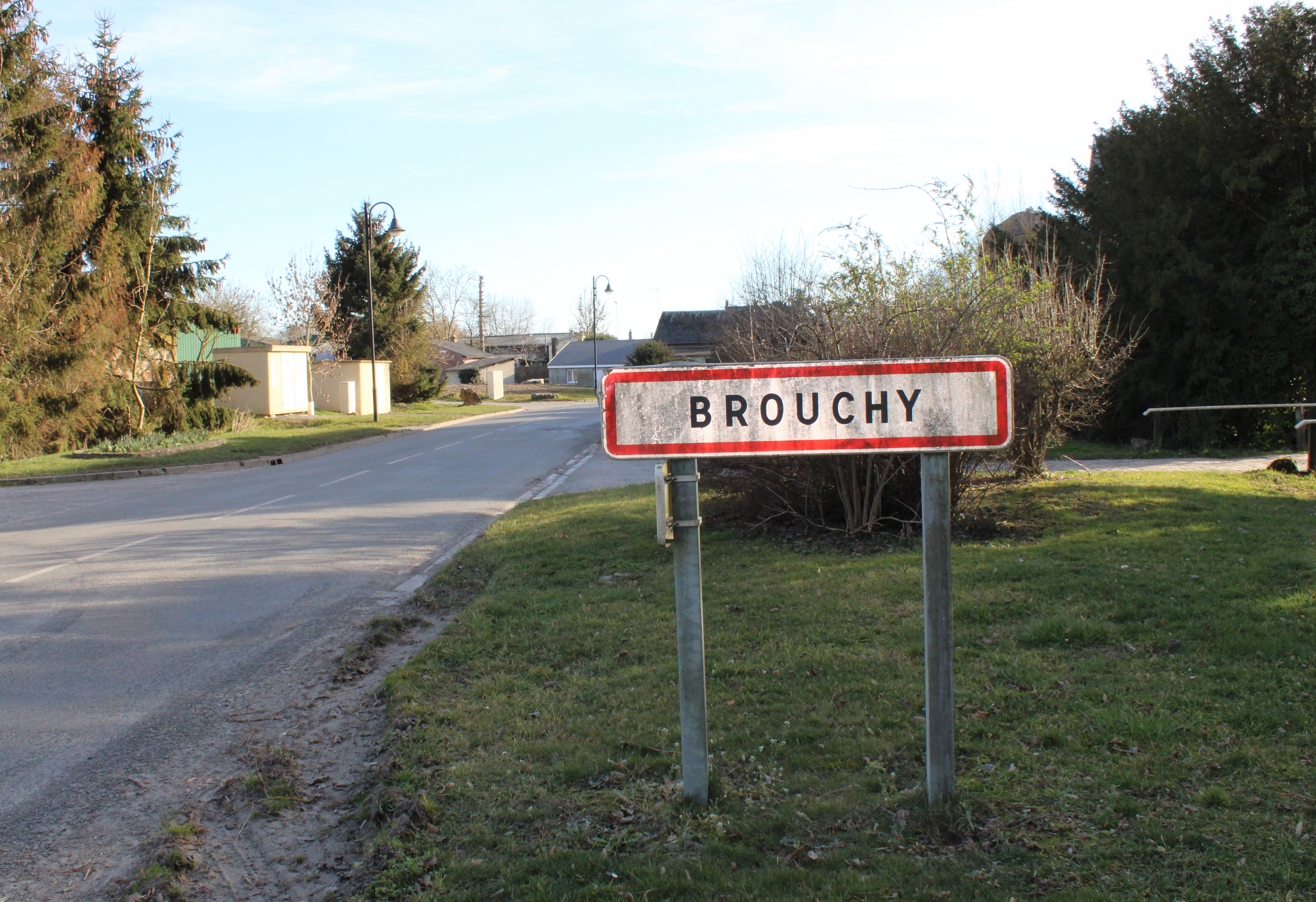 Entrée du village.